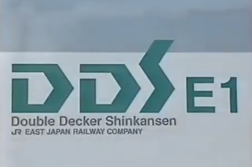 E1系試運転時のロゴ。